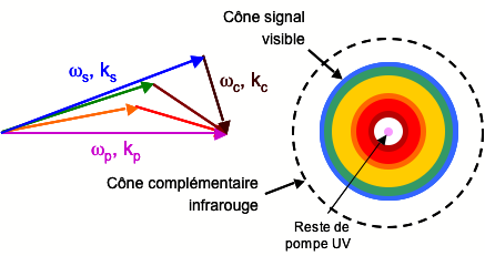 Principe de l'accord de phase non-colinéaire pour la génération d'un cône de fluorescence paramétrique, et schéma correspondant pour une pompe laser ultra-violette. Source : personnelle. Licensing Catégorie:Schéma de physique